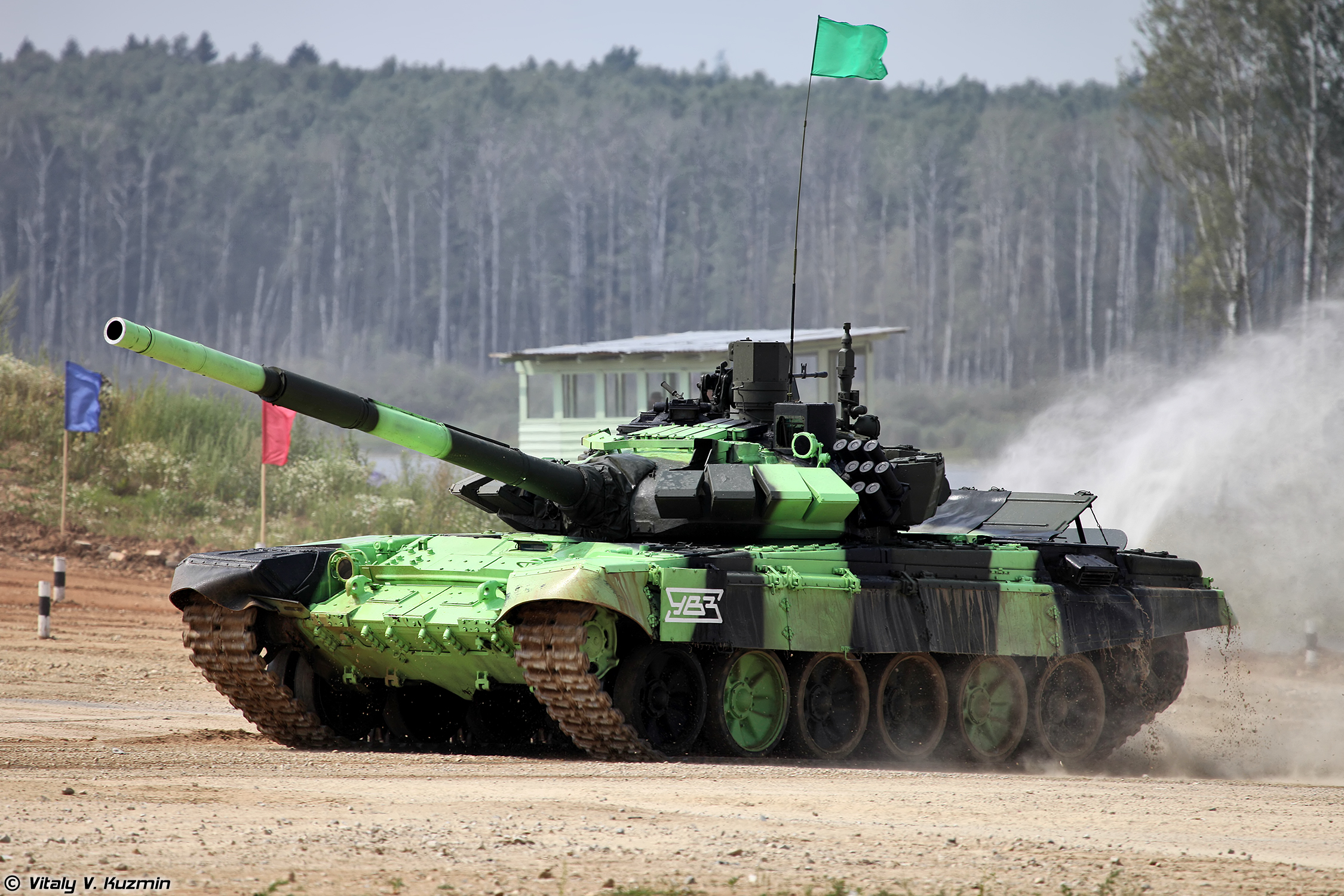 Команда России выступает на Т-72Б3М (T-72B3M of Russian team)